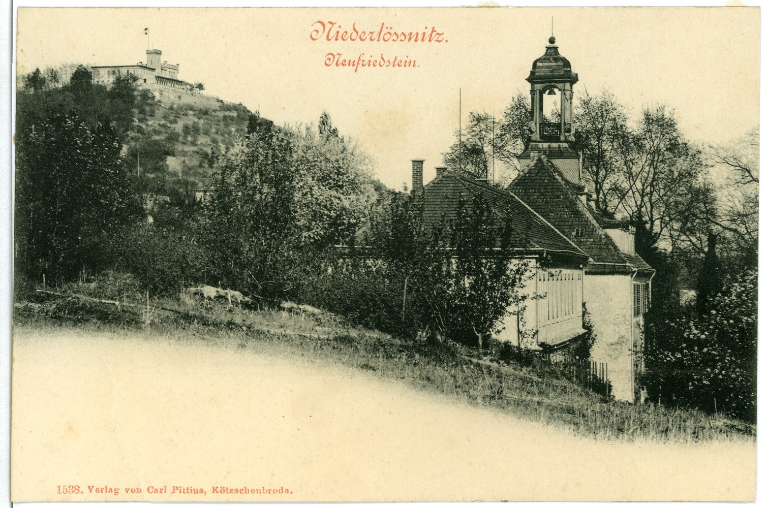 Niederlößnitz; Neufriedstein This postcard is from publisher Brück & Sohn in Meißen ( postcard has a unique number 01538 and is available in a higher resolution at the publisher. This images was uploaded in a cooperation project between Wikipedians and the publisher.